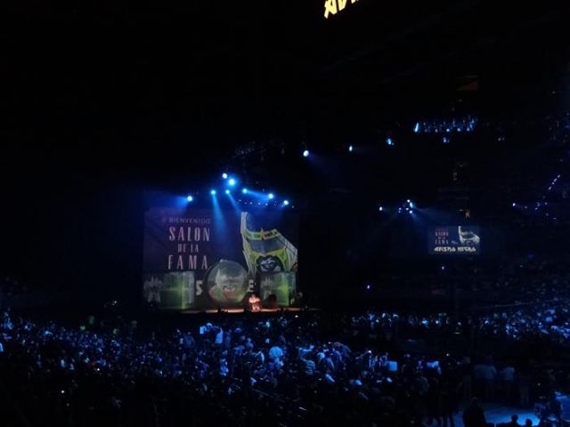 Induccion al salon de la fama AAA